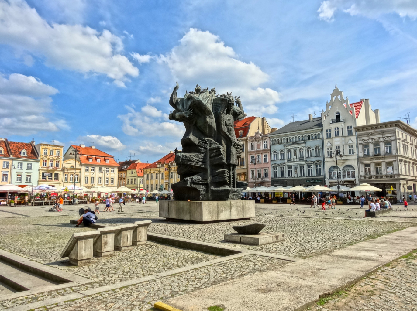 Stary Rynek w Bydgoszczy